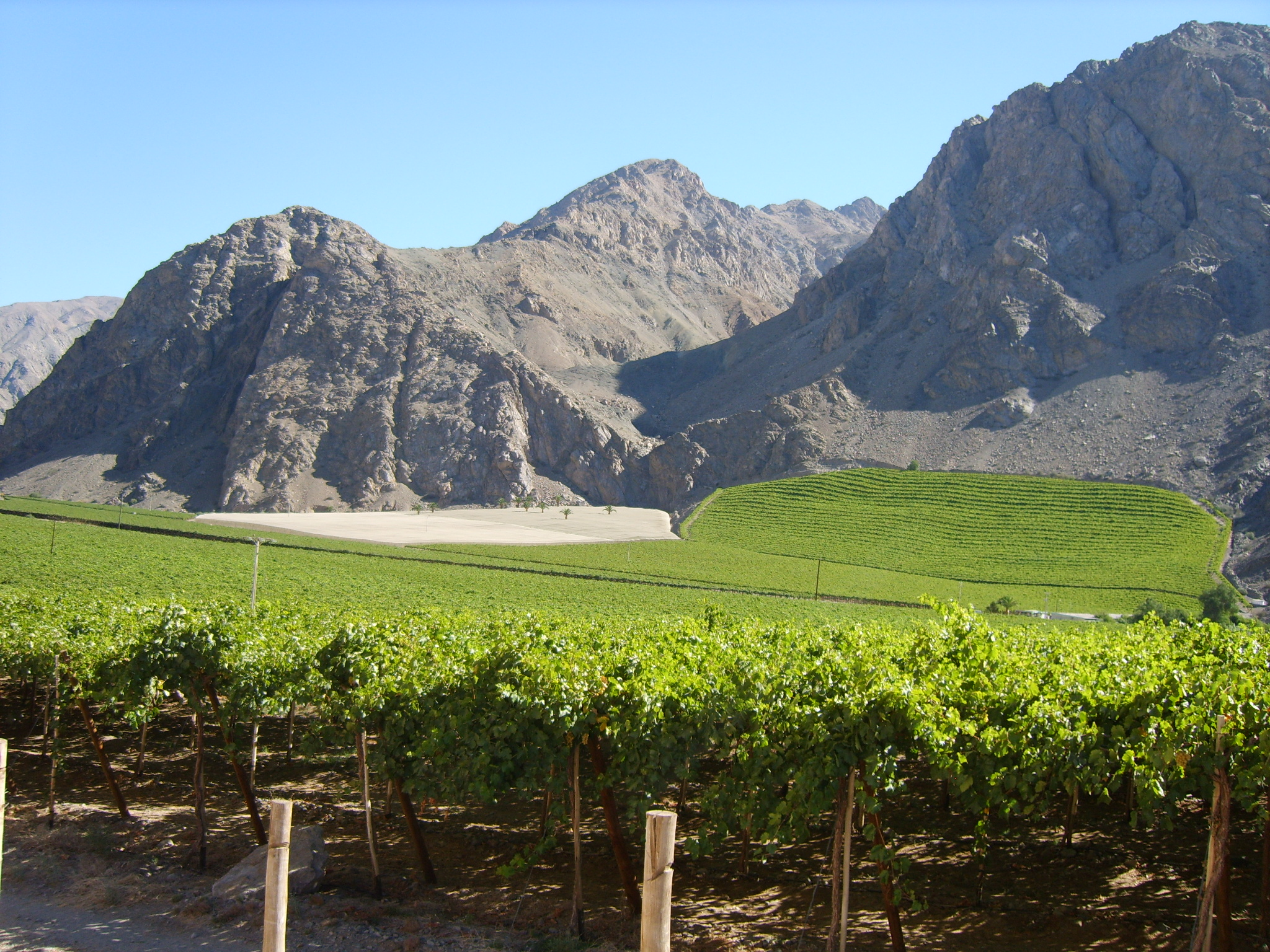 Viñedos en el camino hacia Los Loros